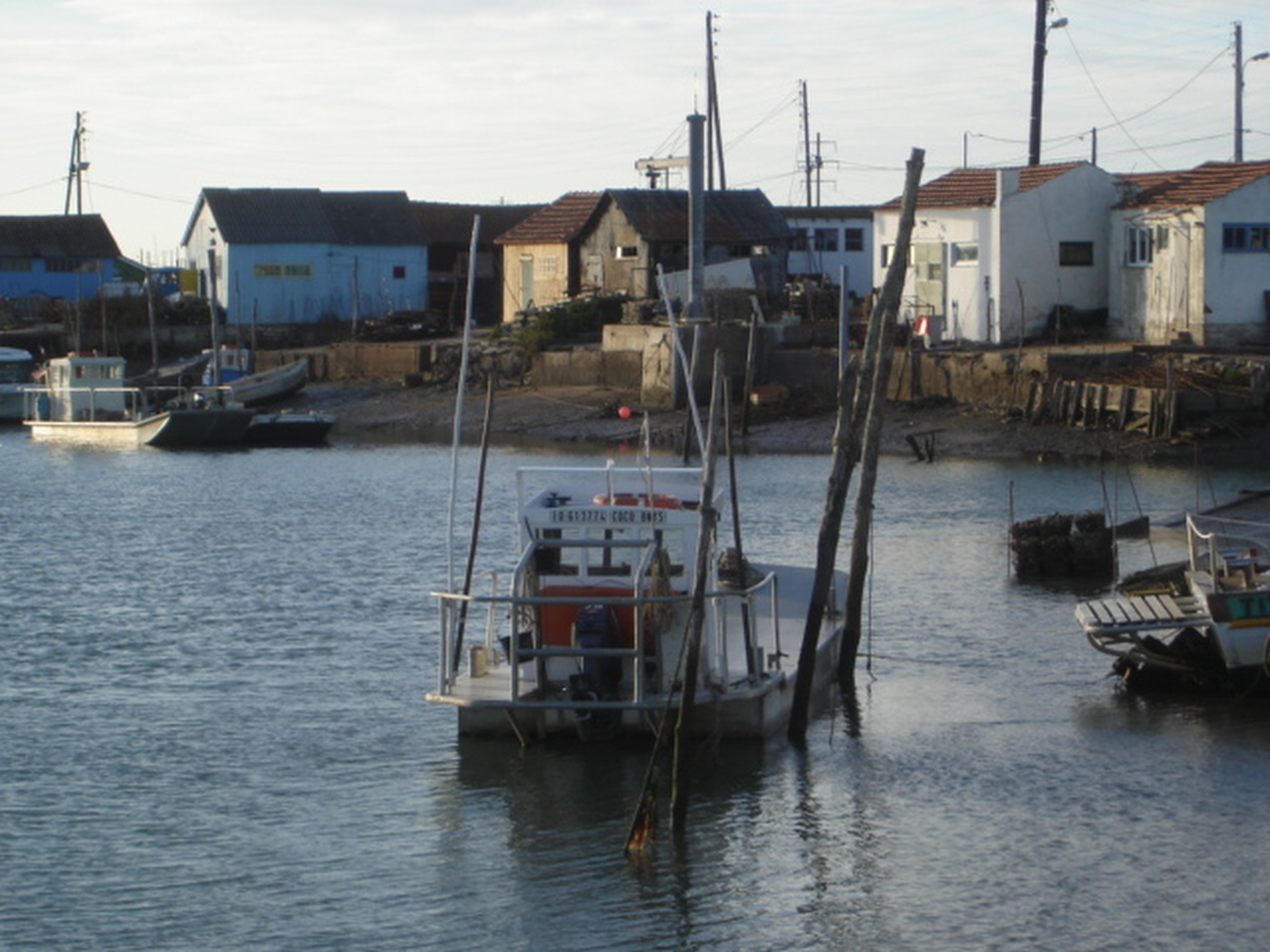 Bateau d'ostreiculteur à fond plat-Chateau d'Oleron Auteur : Jean-Claude Perez